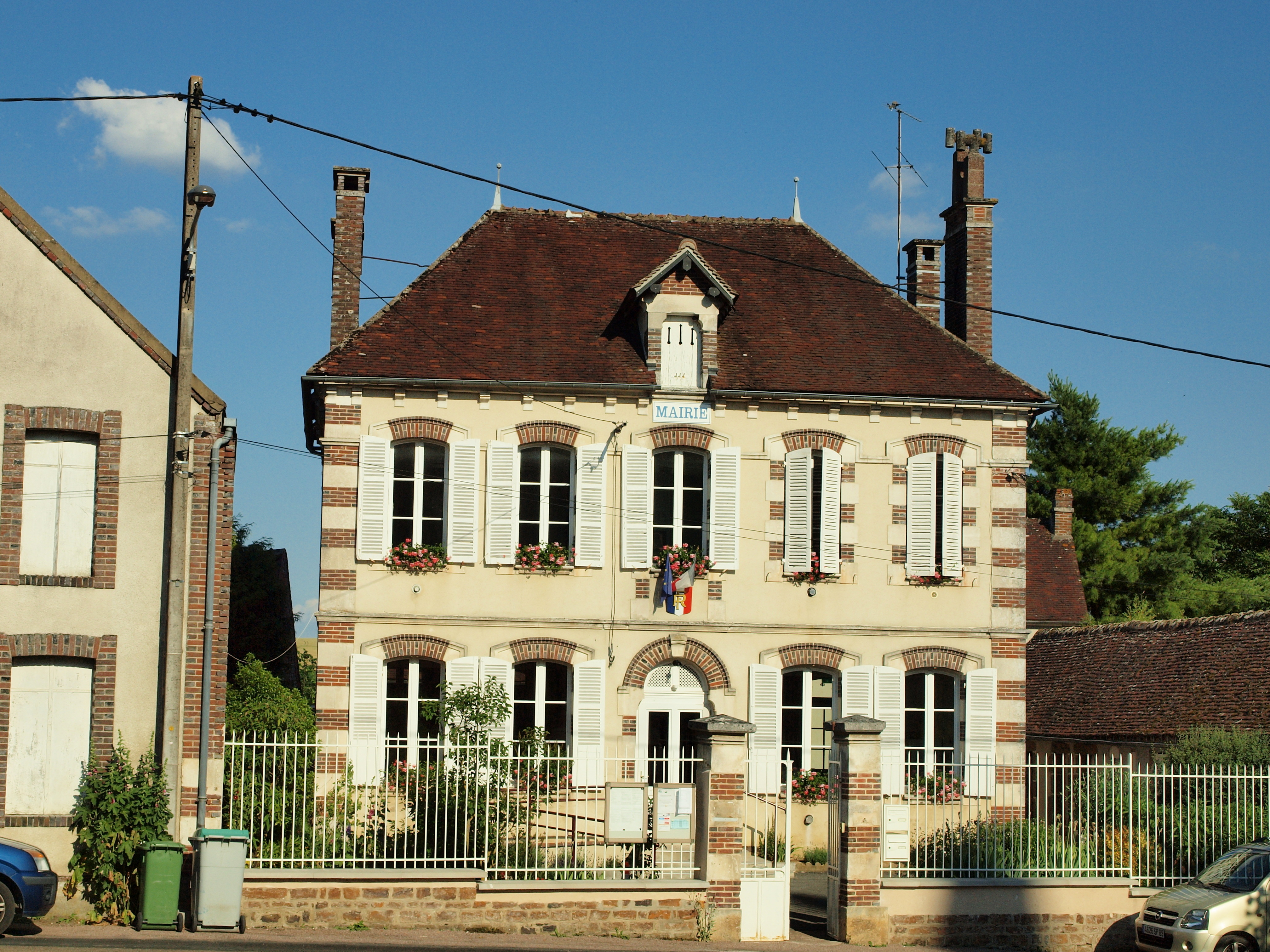 Égleny (Yonne, France)